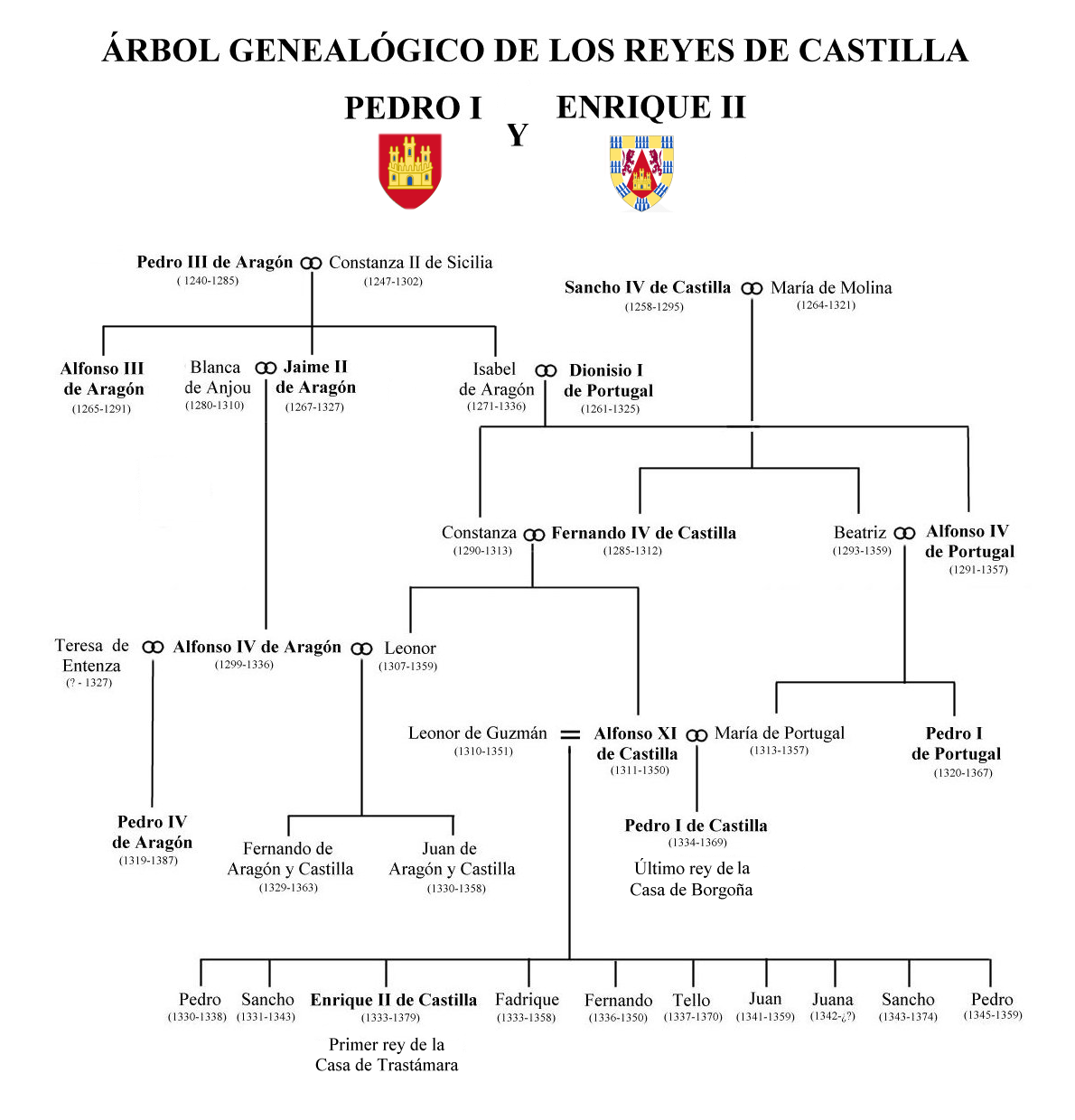 Arbre généalogique des rois de Castille, Pedro I de Castilla, le ‘’Cruel‘ et Enrique II de Trastámara.